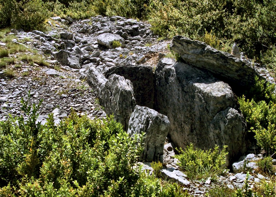 Dolmen de Pleyro Clabado